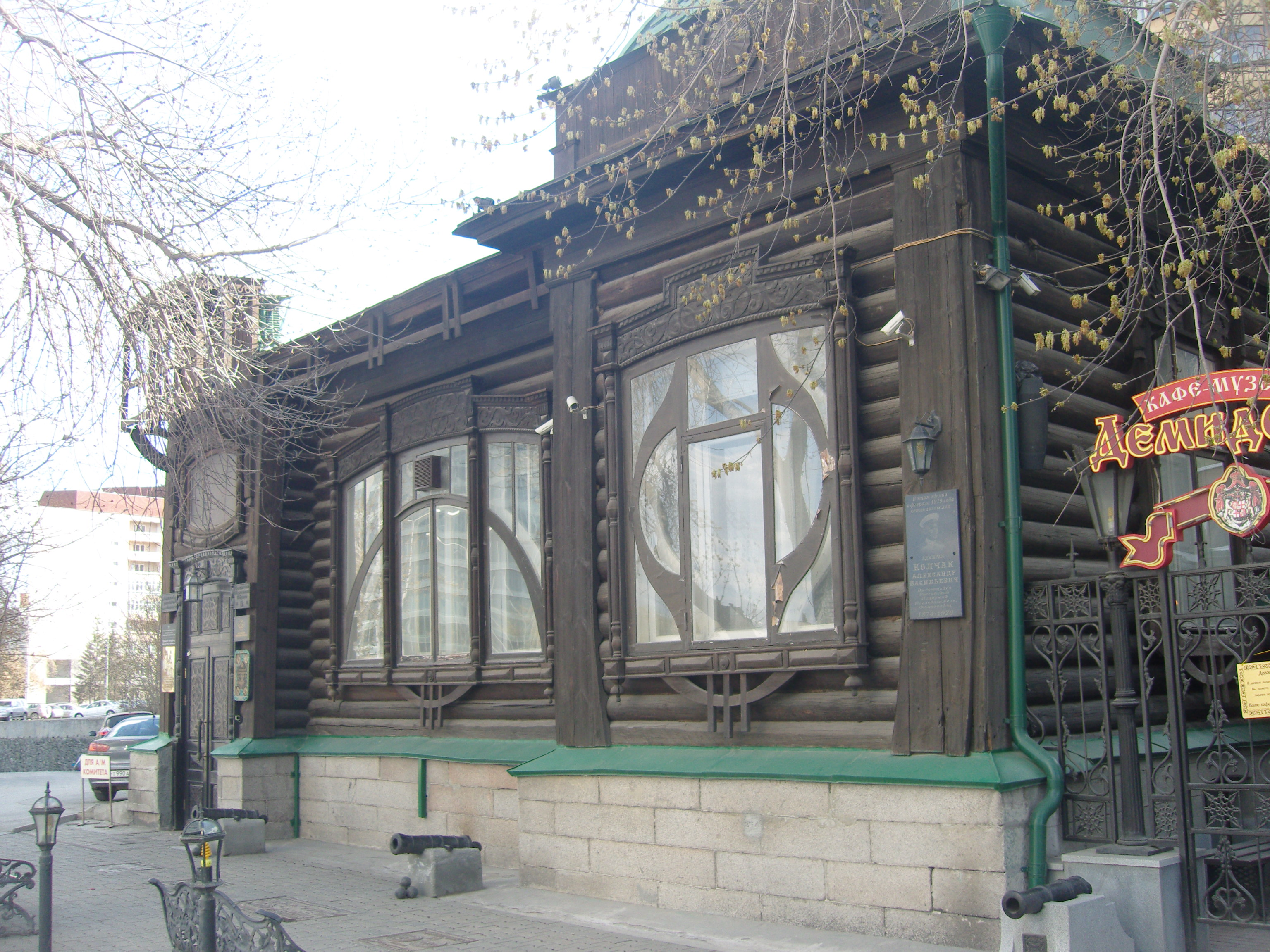 Дом Мишиных